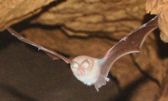 Foto de Rhinolophus euryale en vuelo.